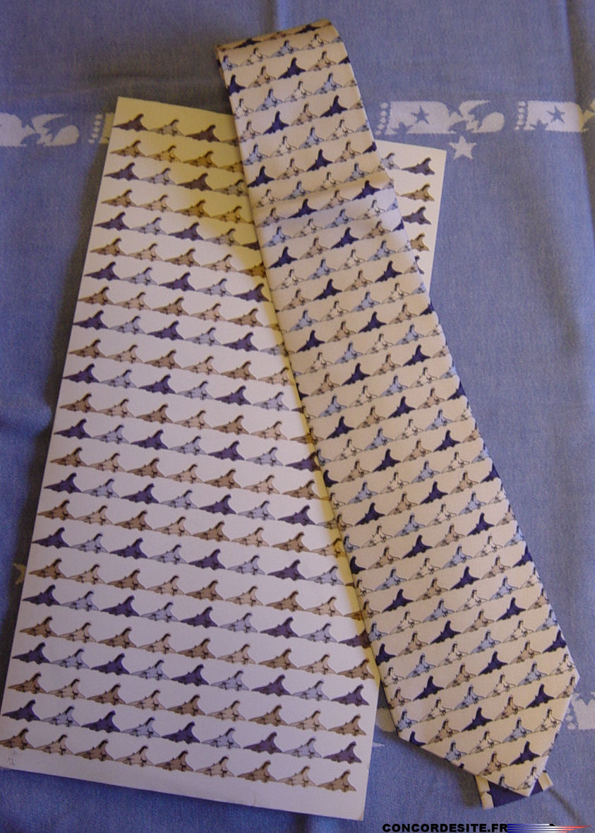 Cravate motif CONCORDE